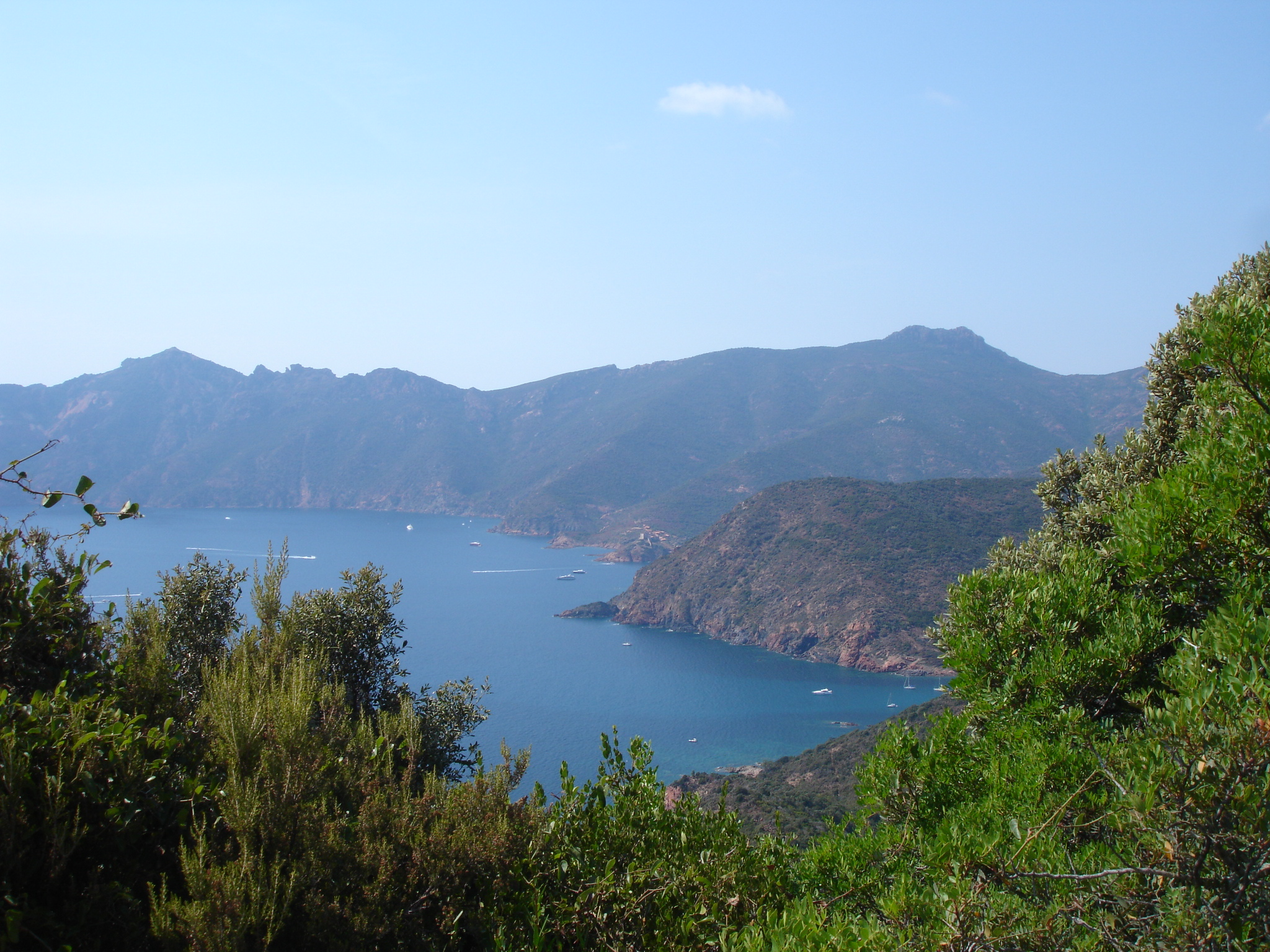 France, Corse-du-Sud (2A), Golfe de Girolata